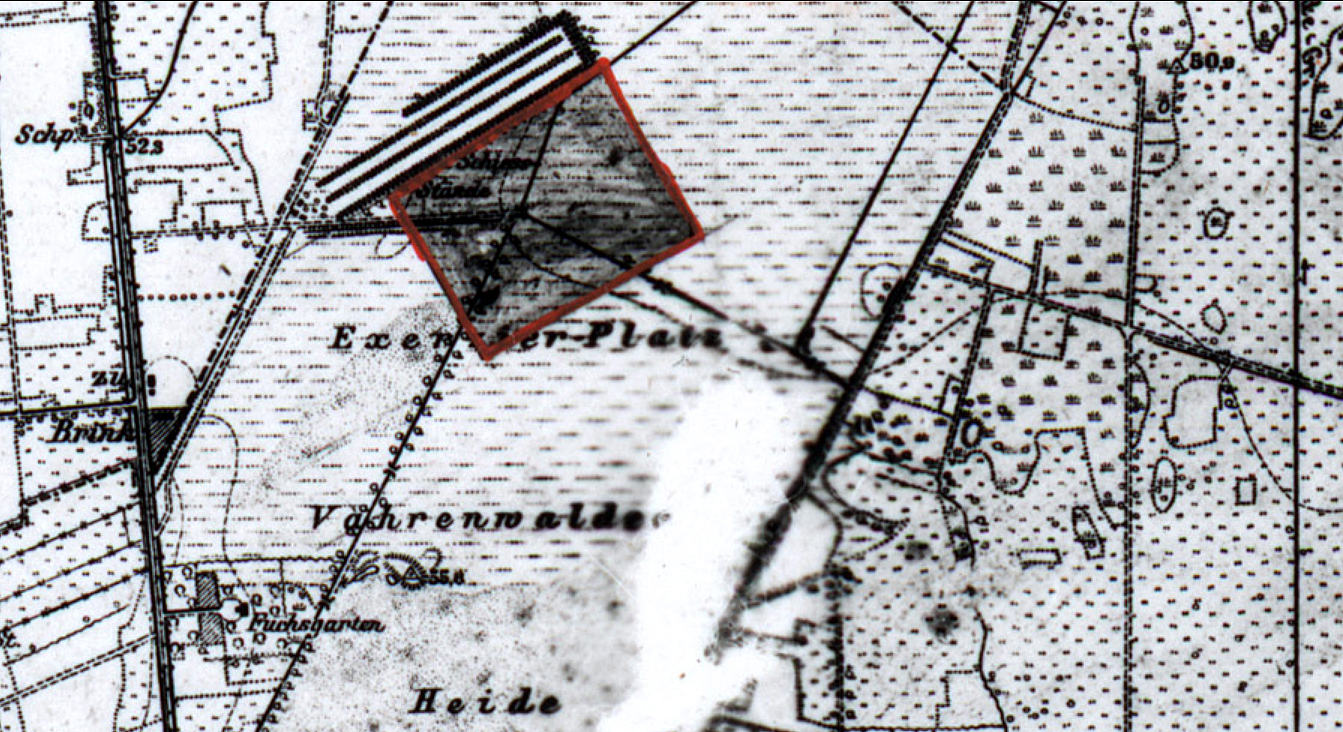 Kartenausschnitt aus dem um 1917 erschienenen Flugplatz-Atlas, hier mit einem Blick auf den Exerzierplatz in der Vahrenwalder Heide östlich der seinerzeitigen Staader Chaussee, der späteren Vahrenwalder Straße ...